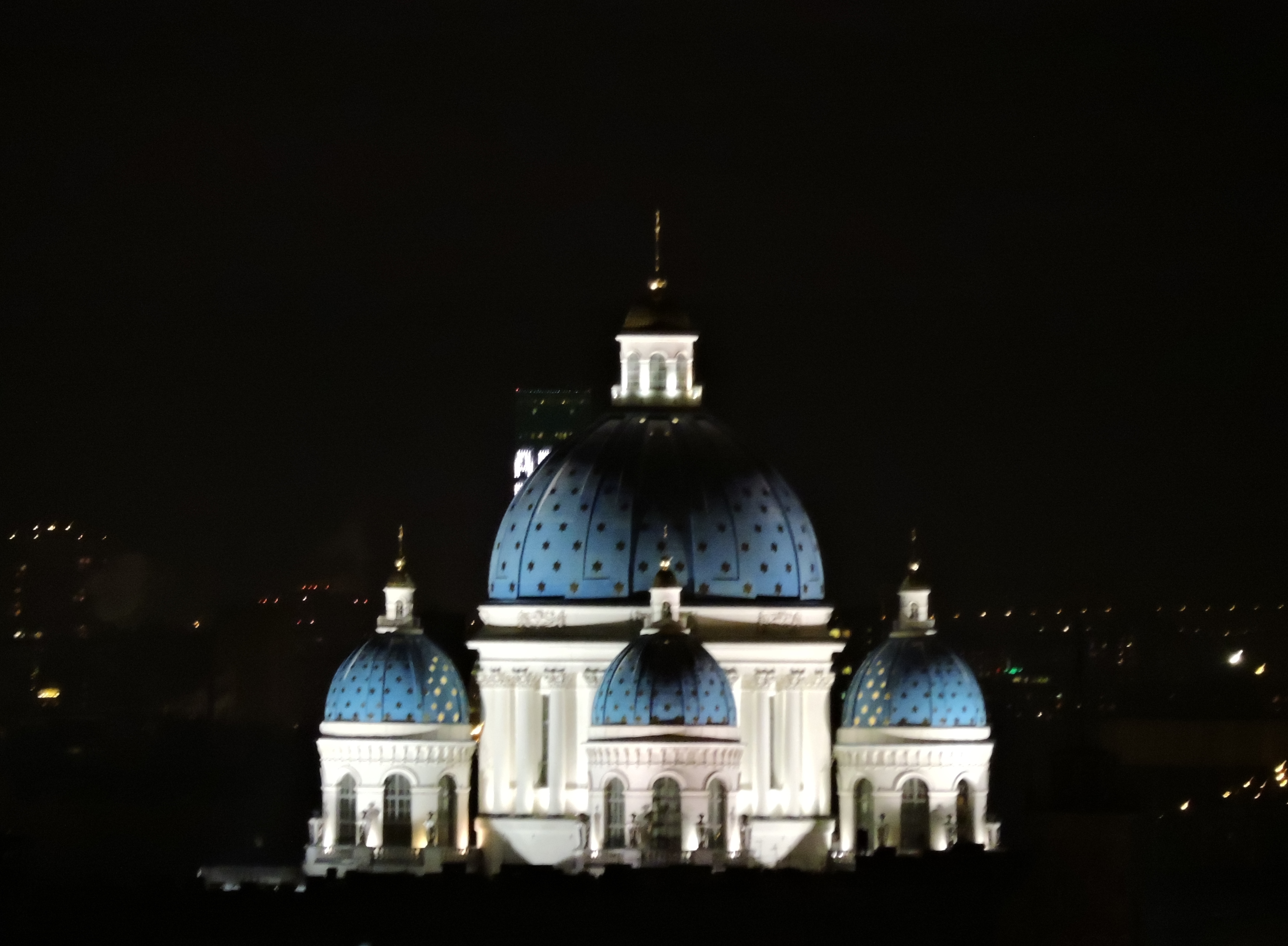 Троице-Измайловский собор ночью